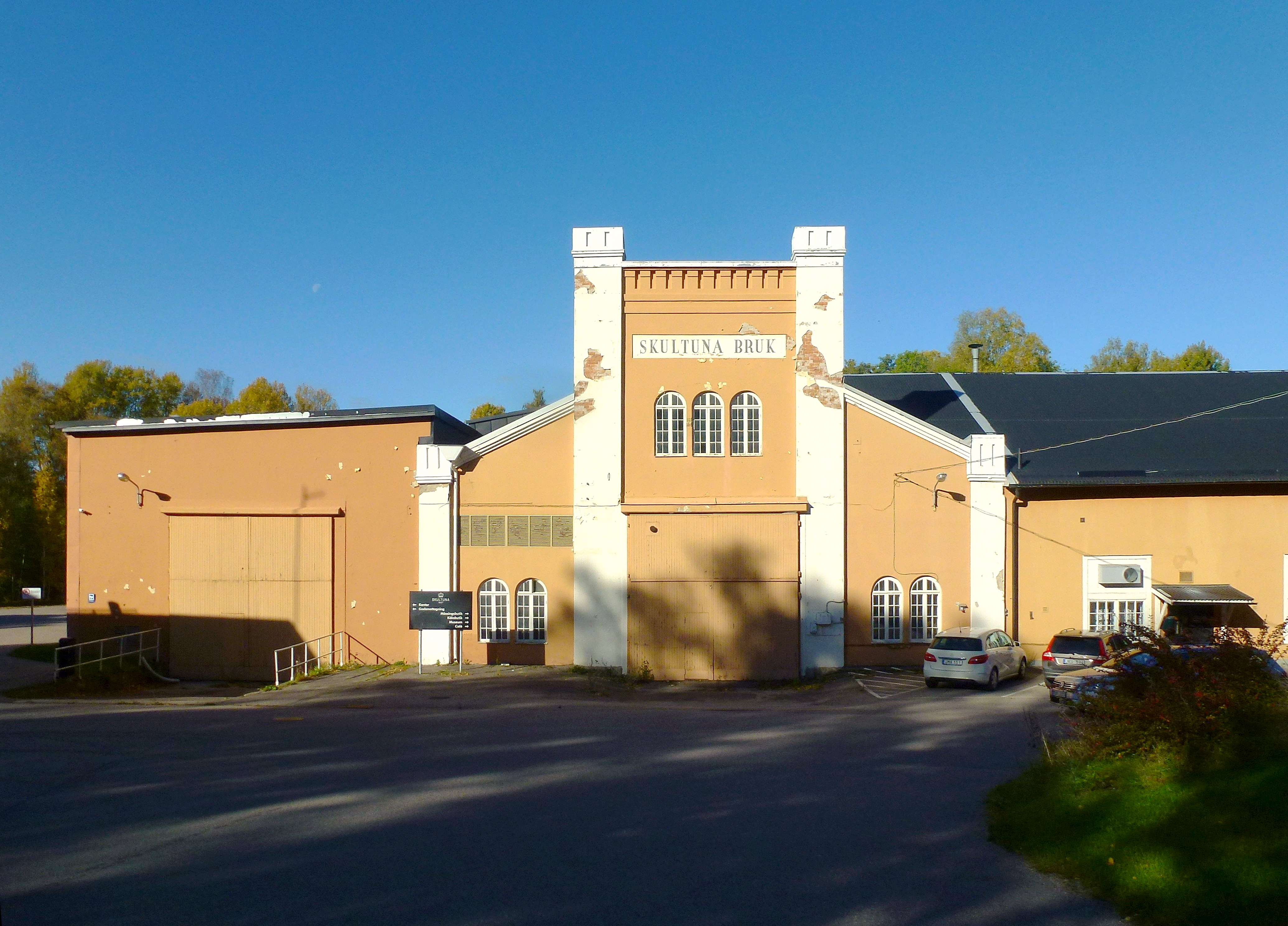 Skultuna bruk